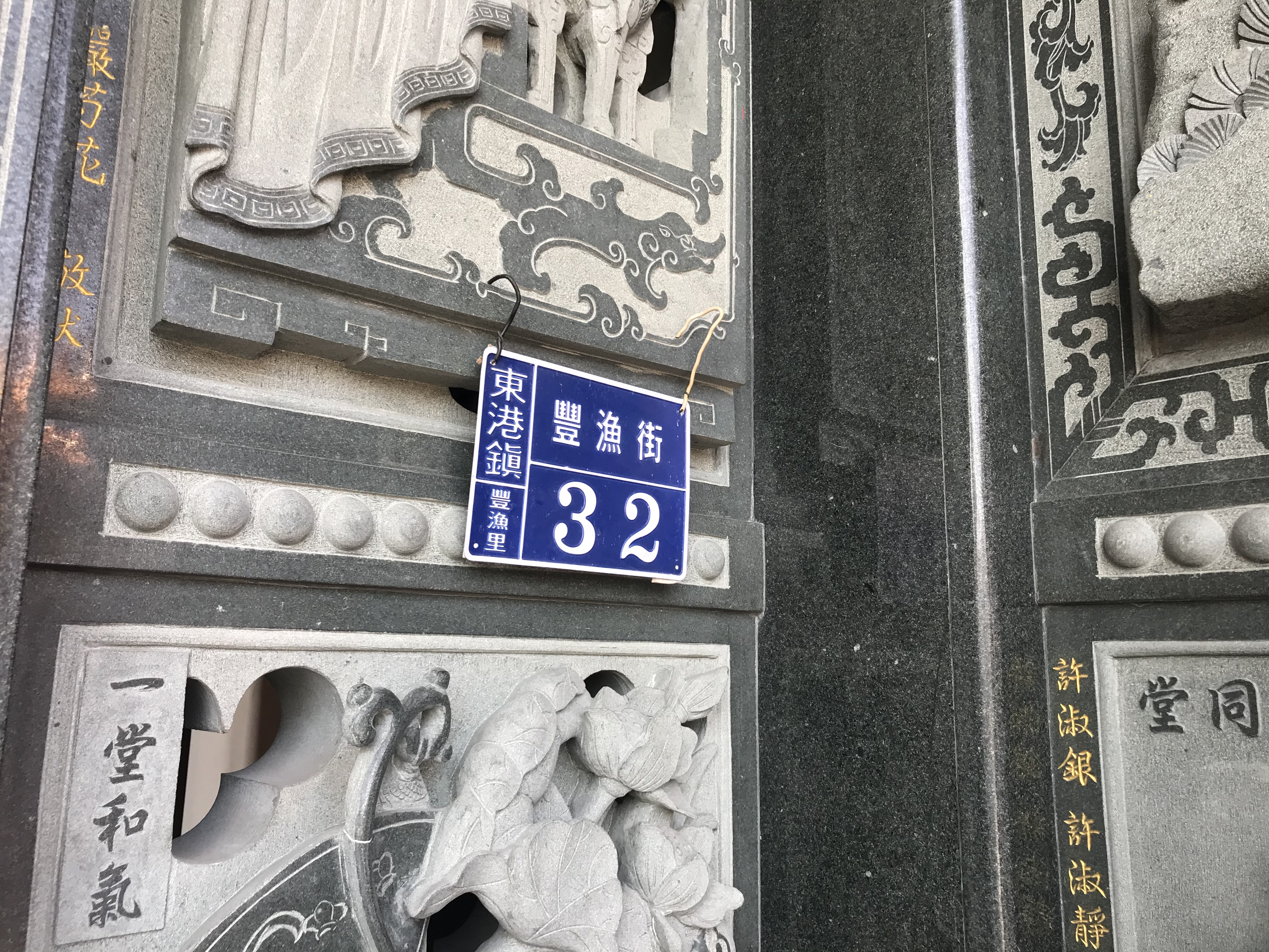 東港豐隆宮門牌